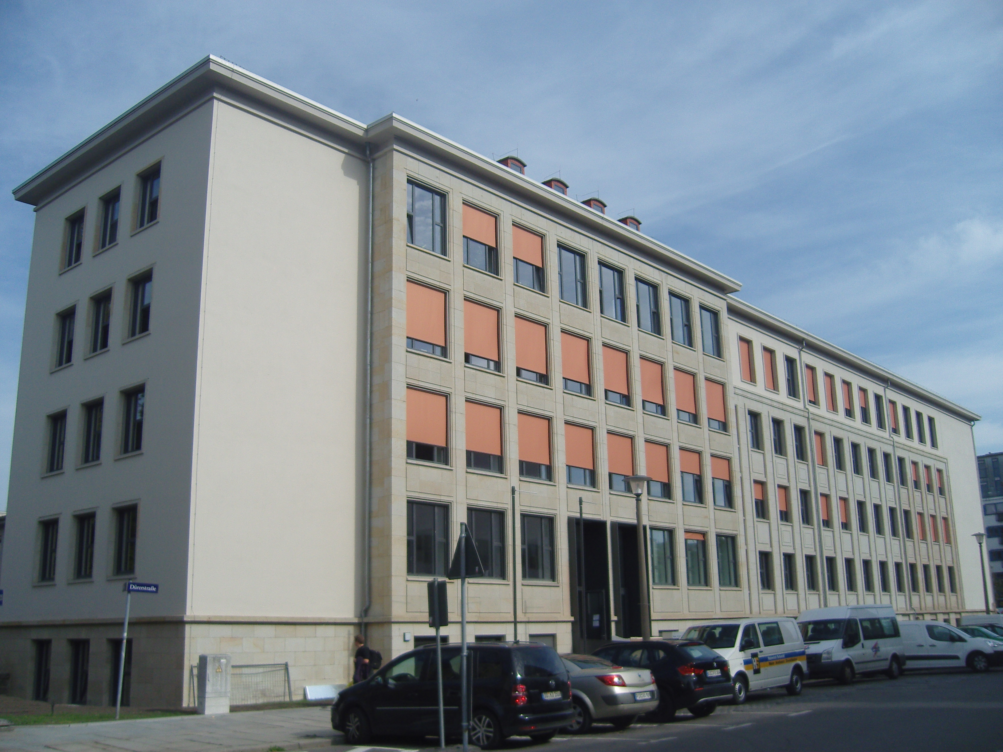 Evangelische Hochschule Dresden in der Dürerstraße